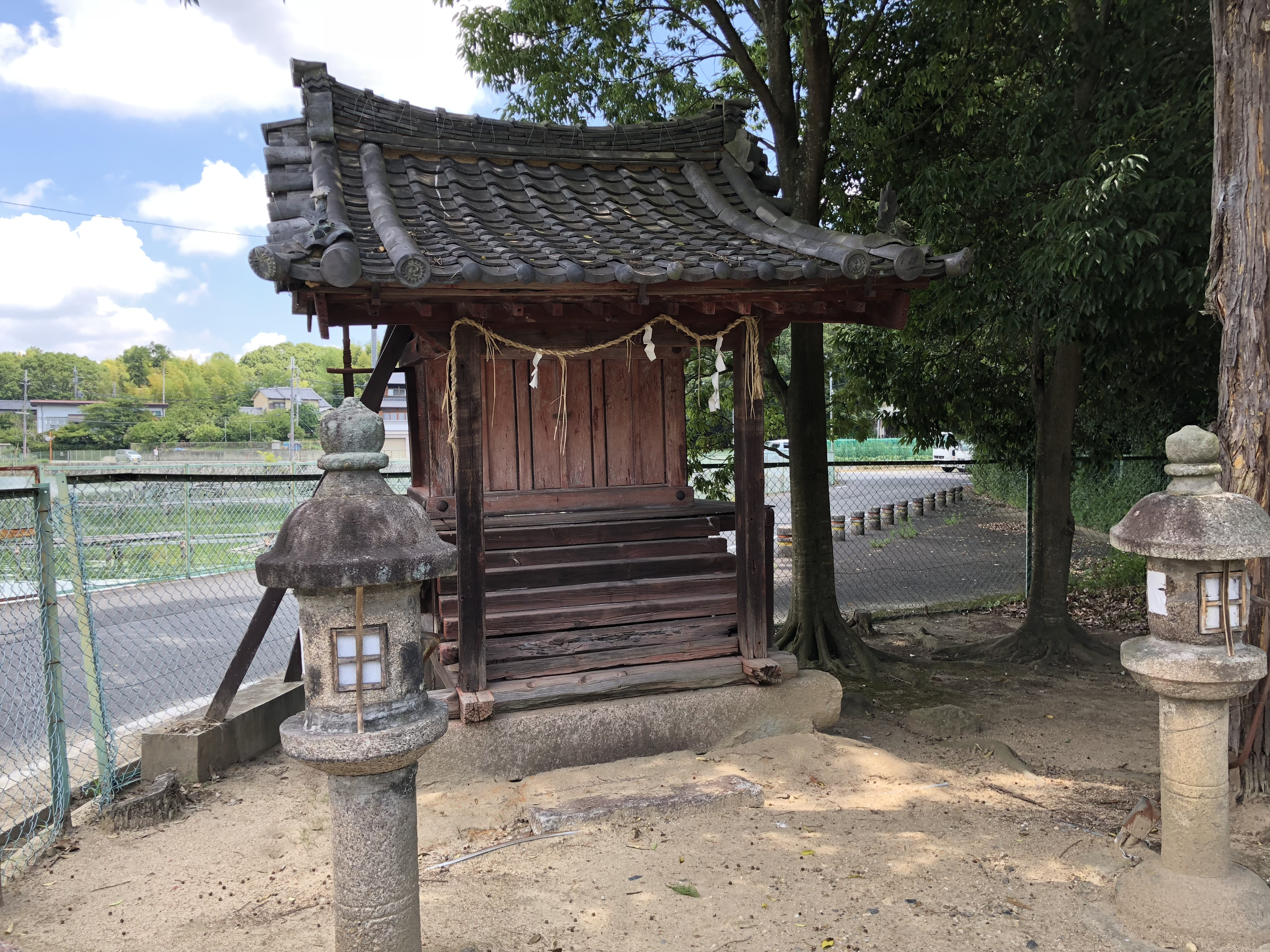 奈良市佐紀町小字亀畑 佐紀神社 境内社